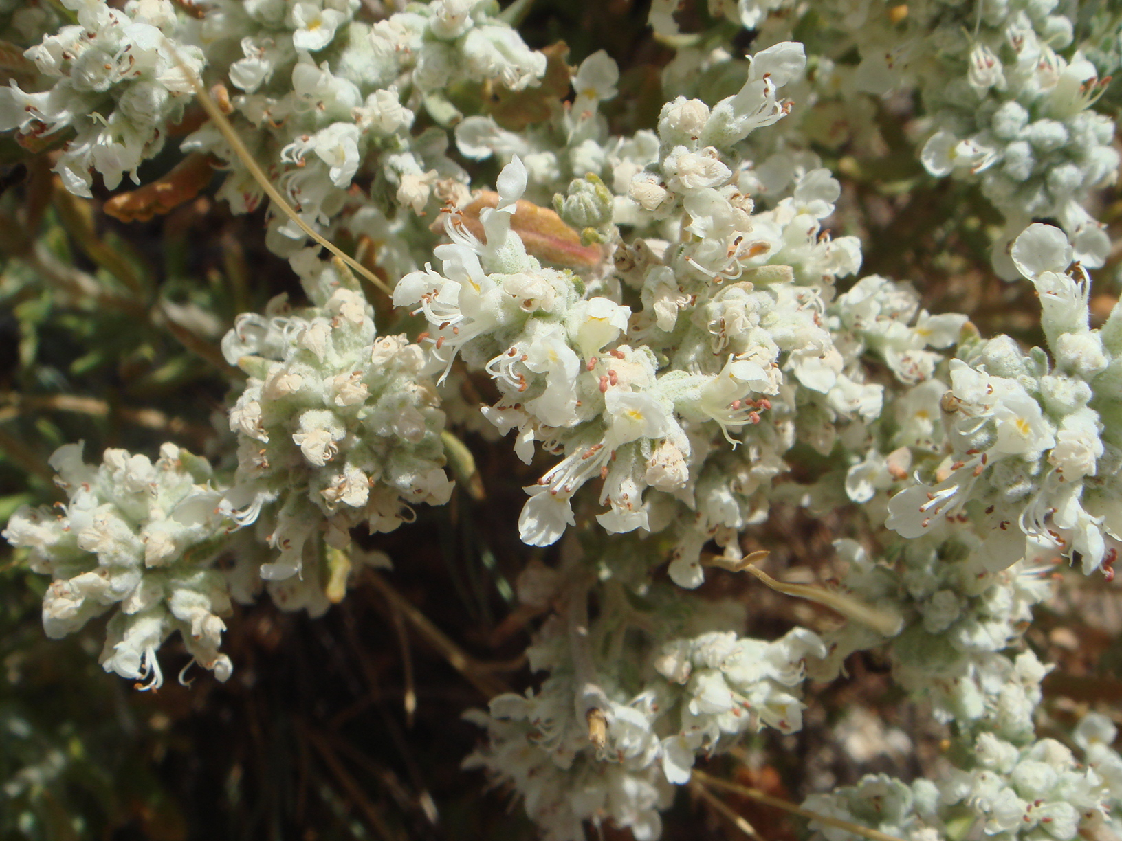 Teucrium capitatum, Paramera de Ávila, Villaviciosa (Ávila), España.